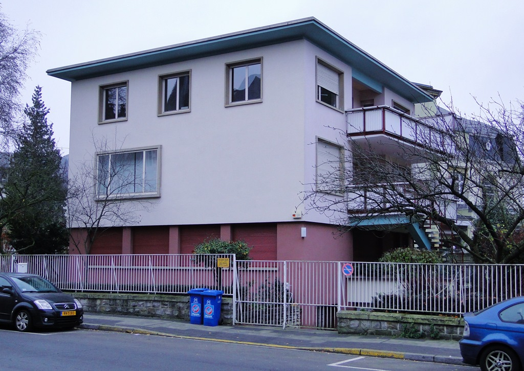 Maison de l'architecte luxembourgeois Pierre Gilbert (1922-1990)